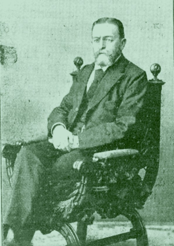 Staatssekretär Freiherr Oswald v. Richthofen